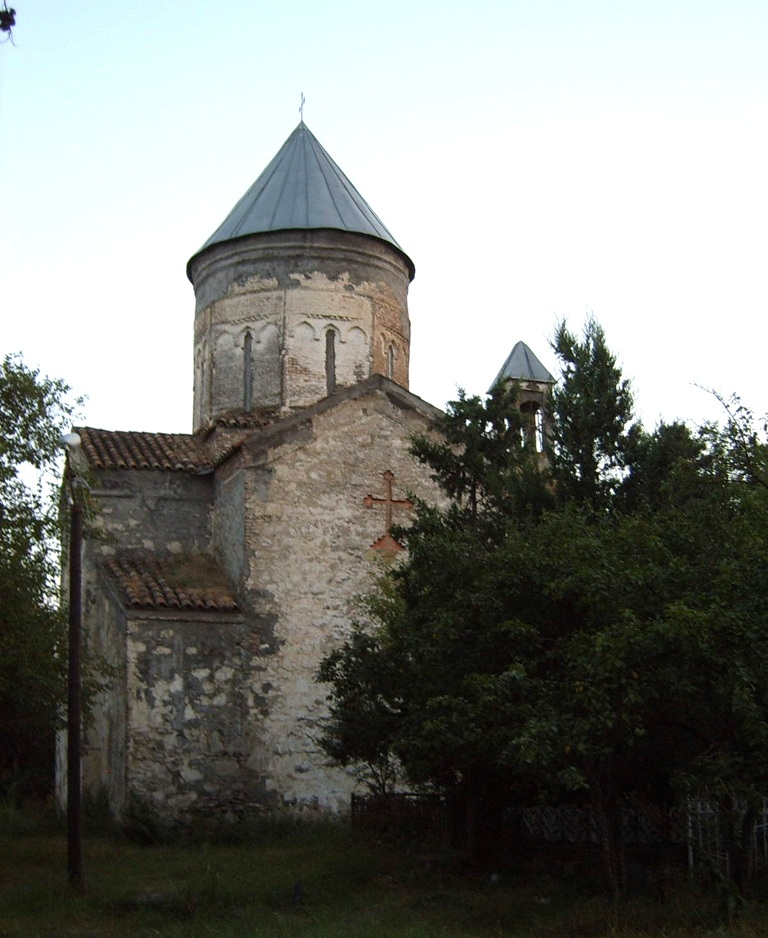 ზემო ალვანის სამების ეკლესია